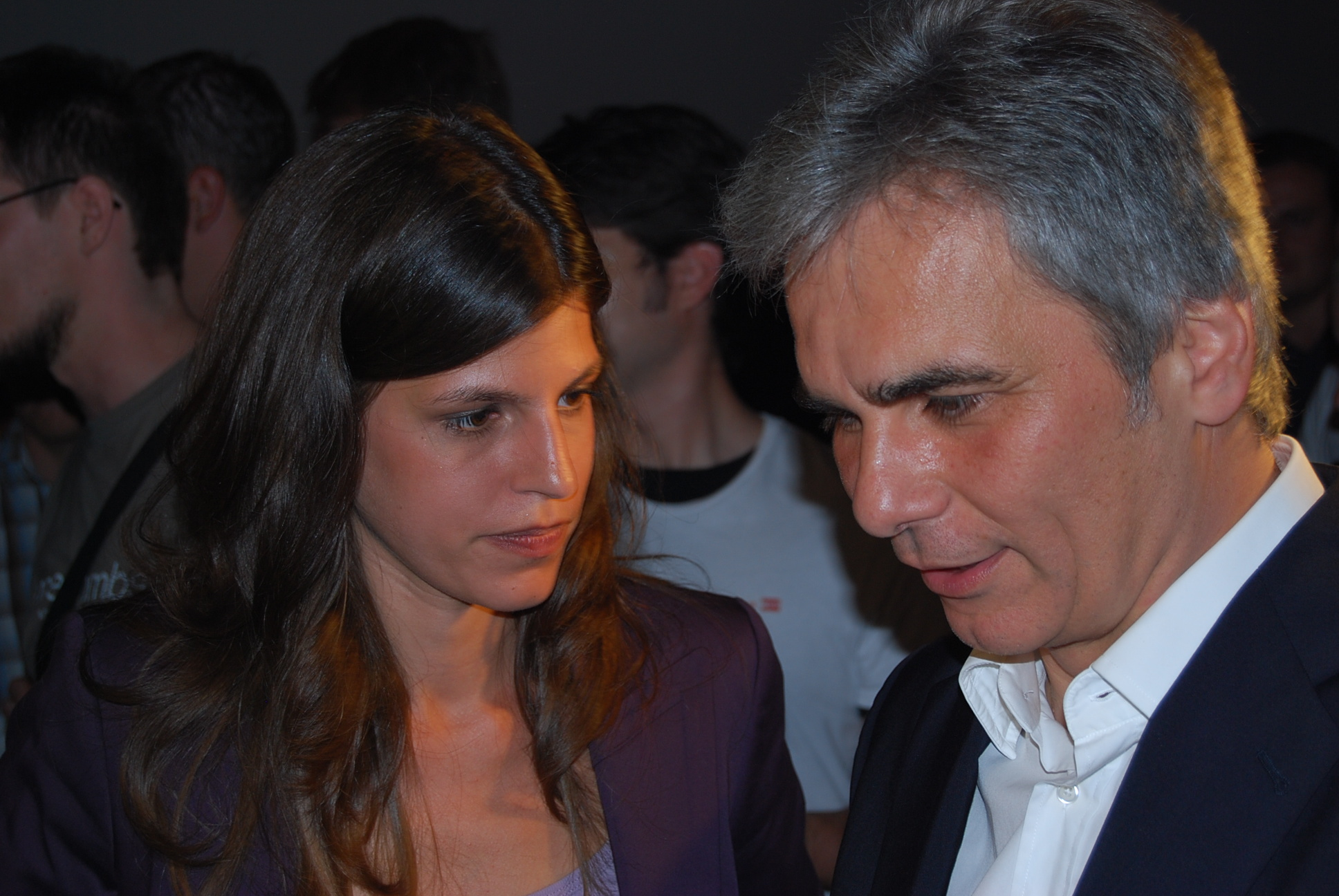 Laura Rudas mit Bundeskanzler Werner Faymann bei einer SPÖ-Wahlkampfveranstaltung